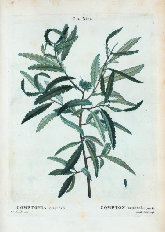 Comptonia ceterach = Compton cétérach.